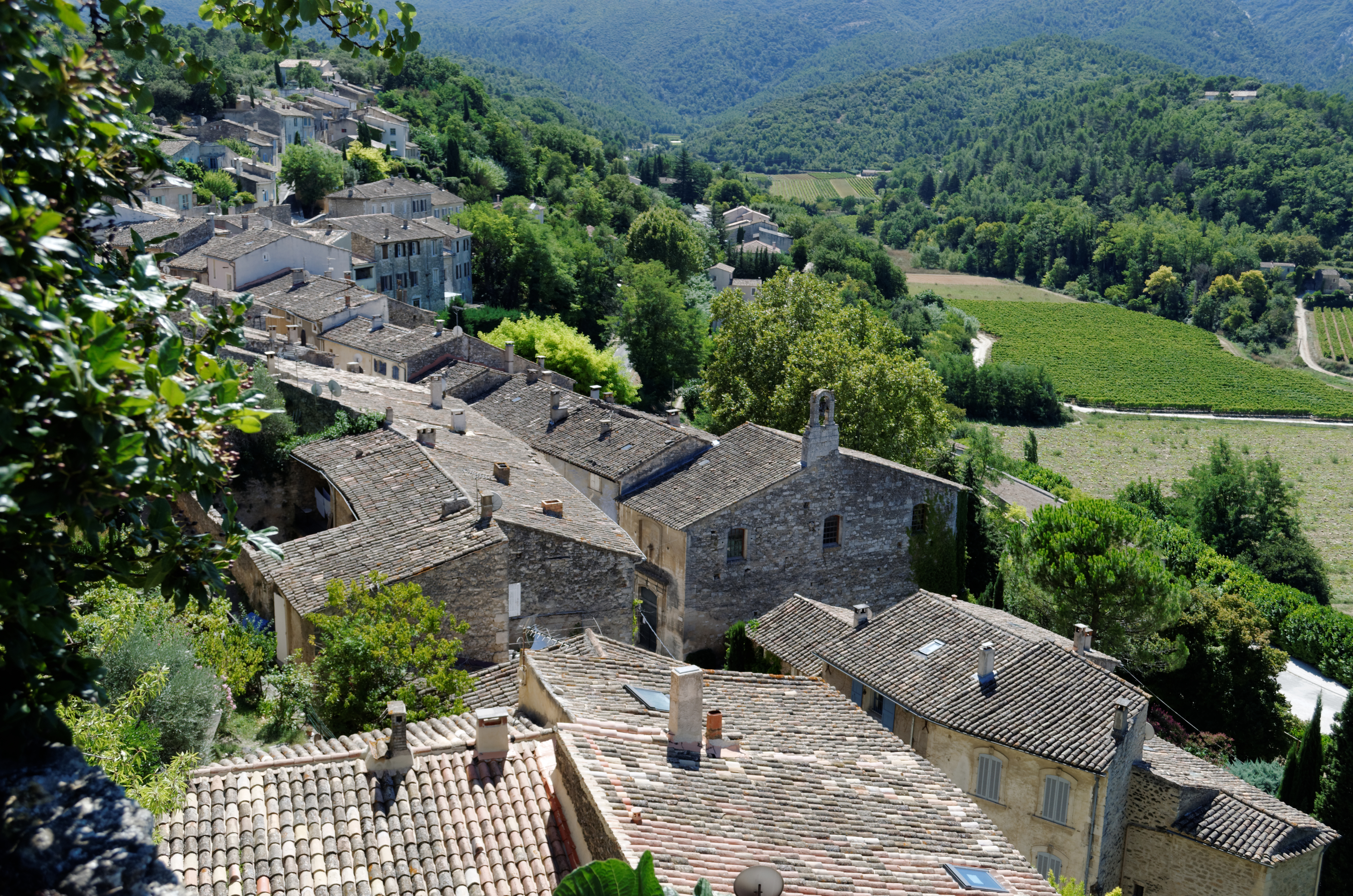 Vue sur le village de Ménerbes